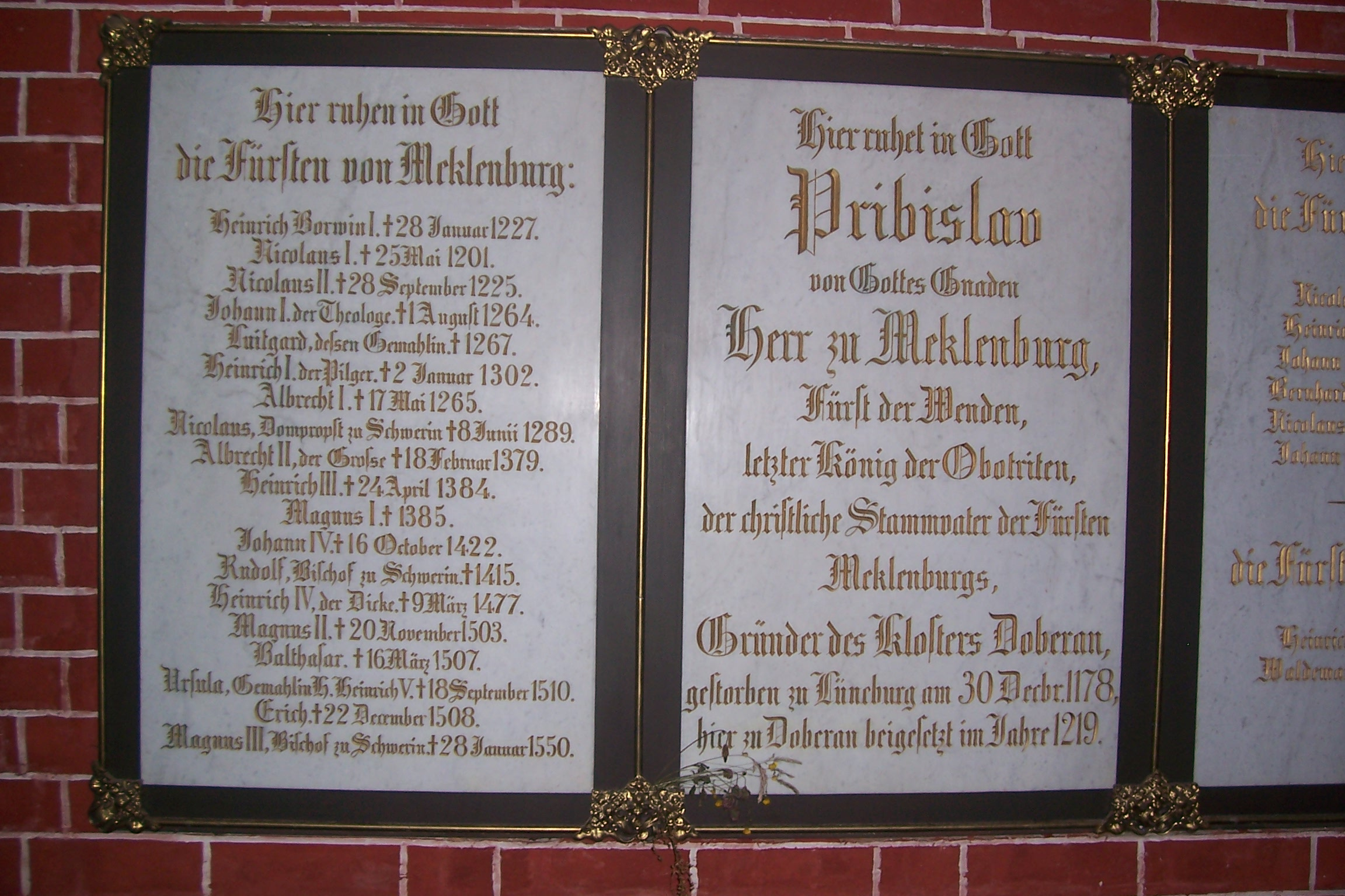 Gedächtnistafel Pribislaws im Doberaner Münster